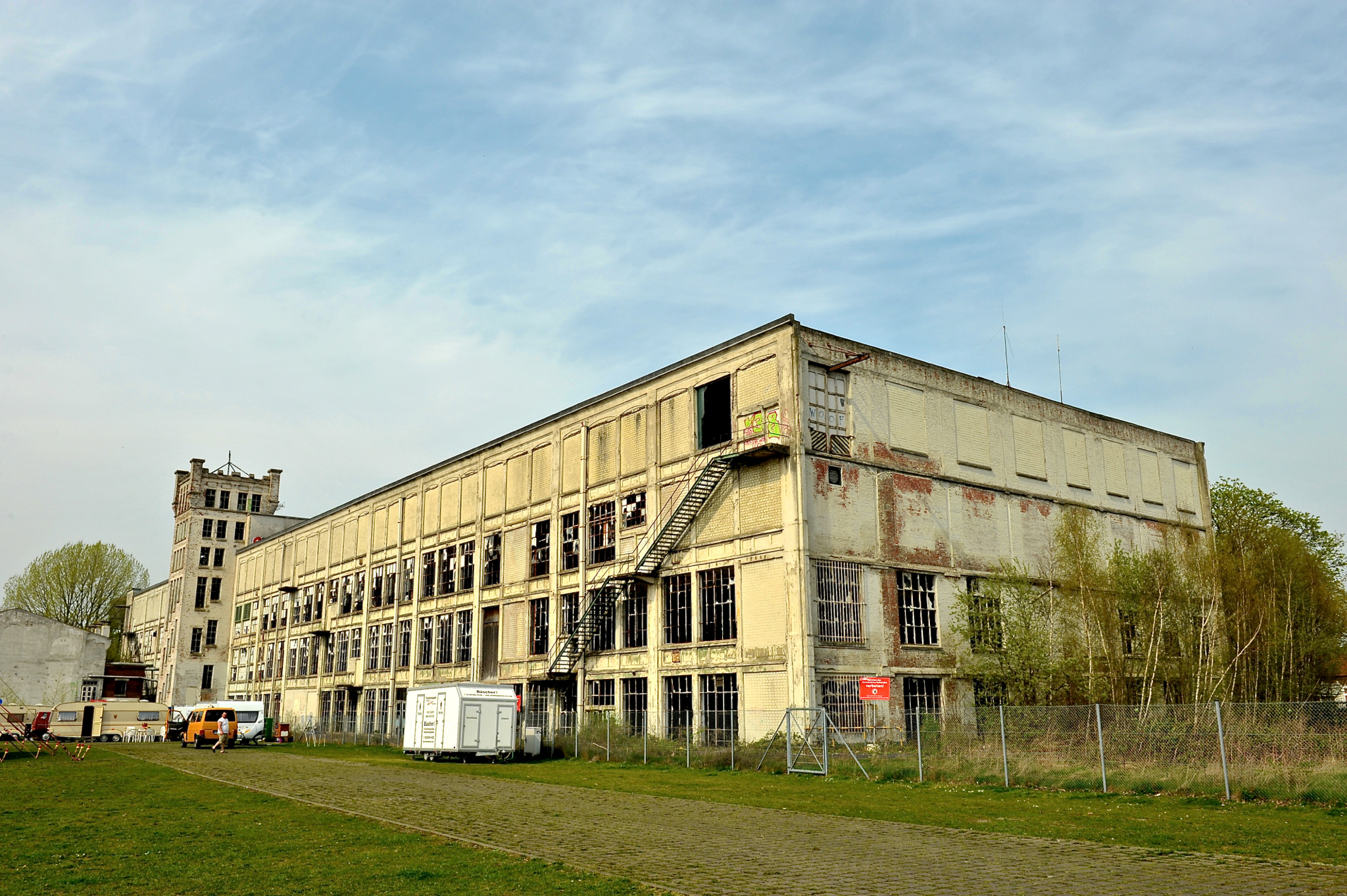 Voormalige textielfabriek behorende tot het textielconcern van Delden. In 1875 gesticht door Gerrit van Delden. Na de 2e wereldoorlog groeide het concern uit tot 1 van de 10 belangrijkste textielondernemingen van de EG. De van Delden groep produceerde o.a. garen voor de confectie-industrie. In 1982 ging het bedrijf failliet door de sterke internationale concurrentie en de import vanuit lagelonen landen.